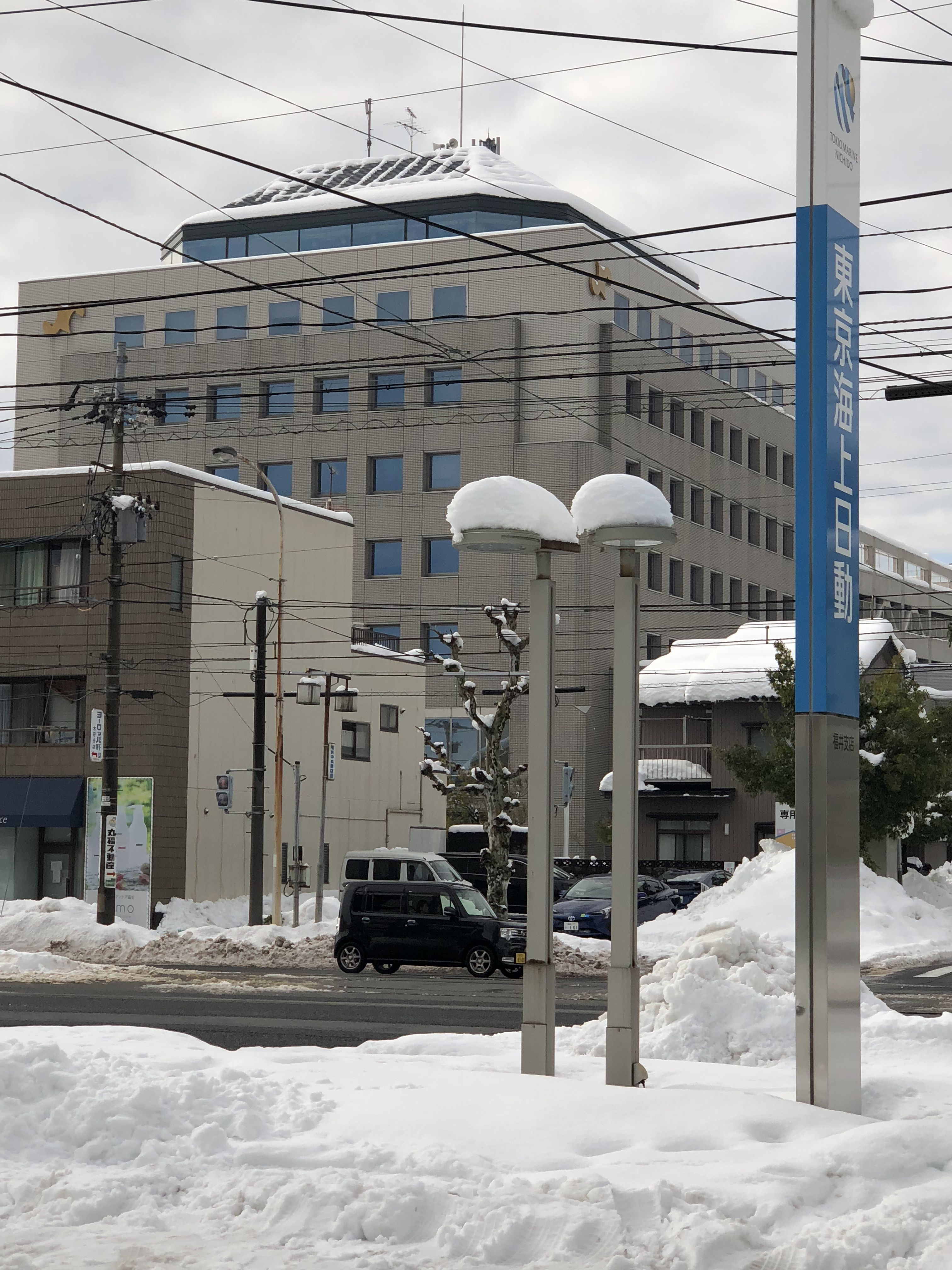 福井商工会議所（フェニックス通りから見た様子）